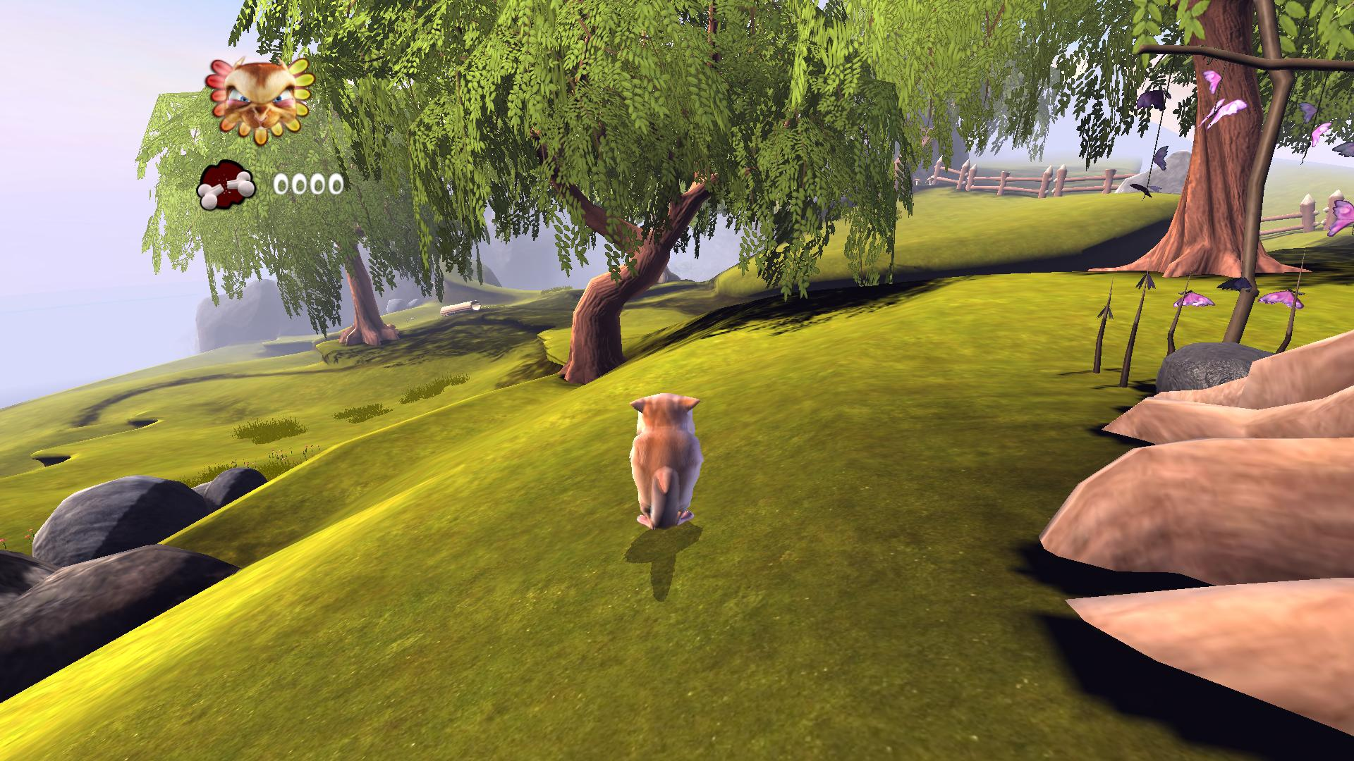 Screenshot z Yo Frankie!